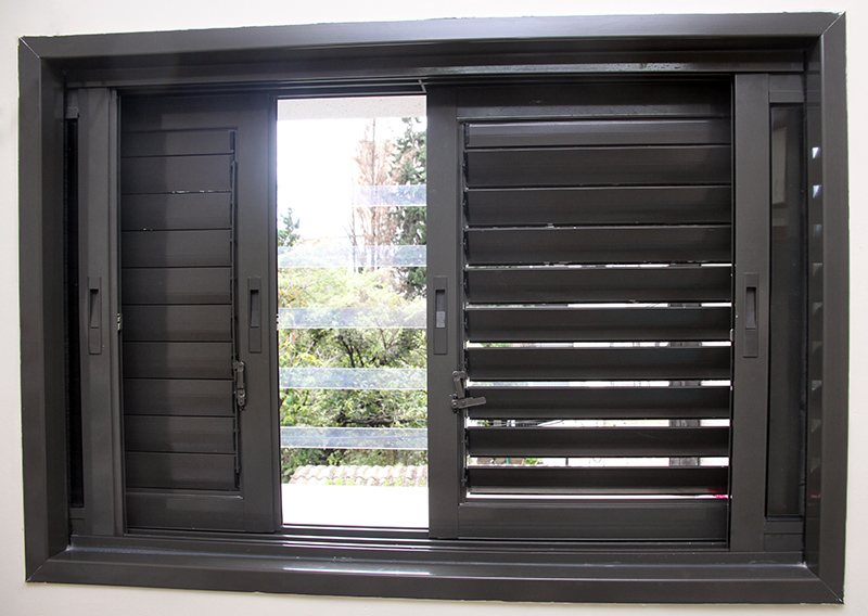 תריס הזזה עם רפפות